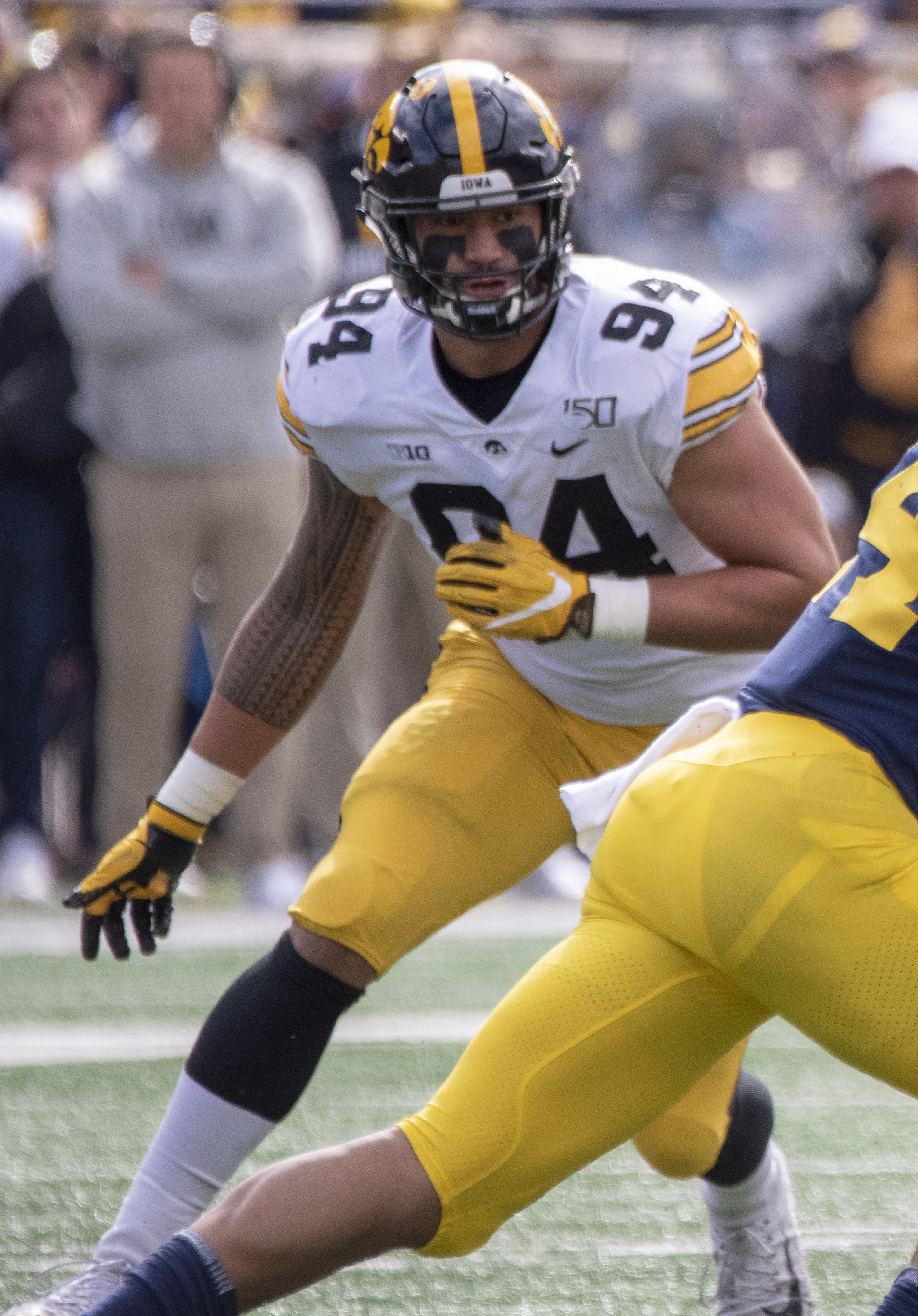 jac.fbc.vsIowa.2019.09.07.0013